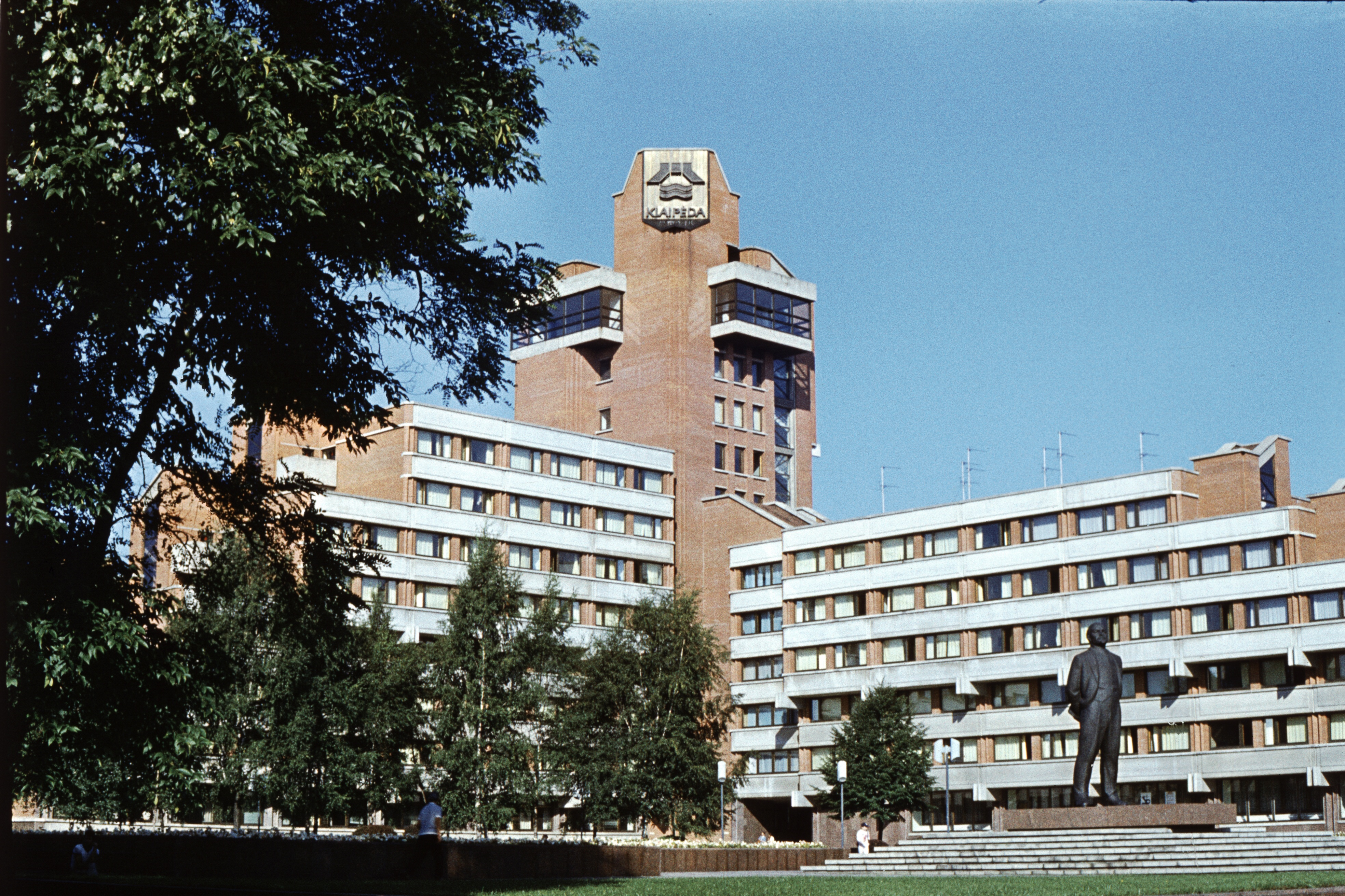 Socha V. I. Lenina na tehdejším Leninově náměstí (dnes Atgimimo aikštė) v Klaipėdě. Pohled od východu